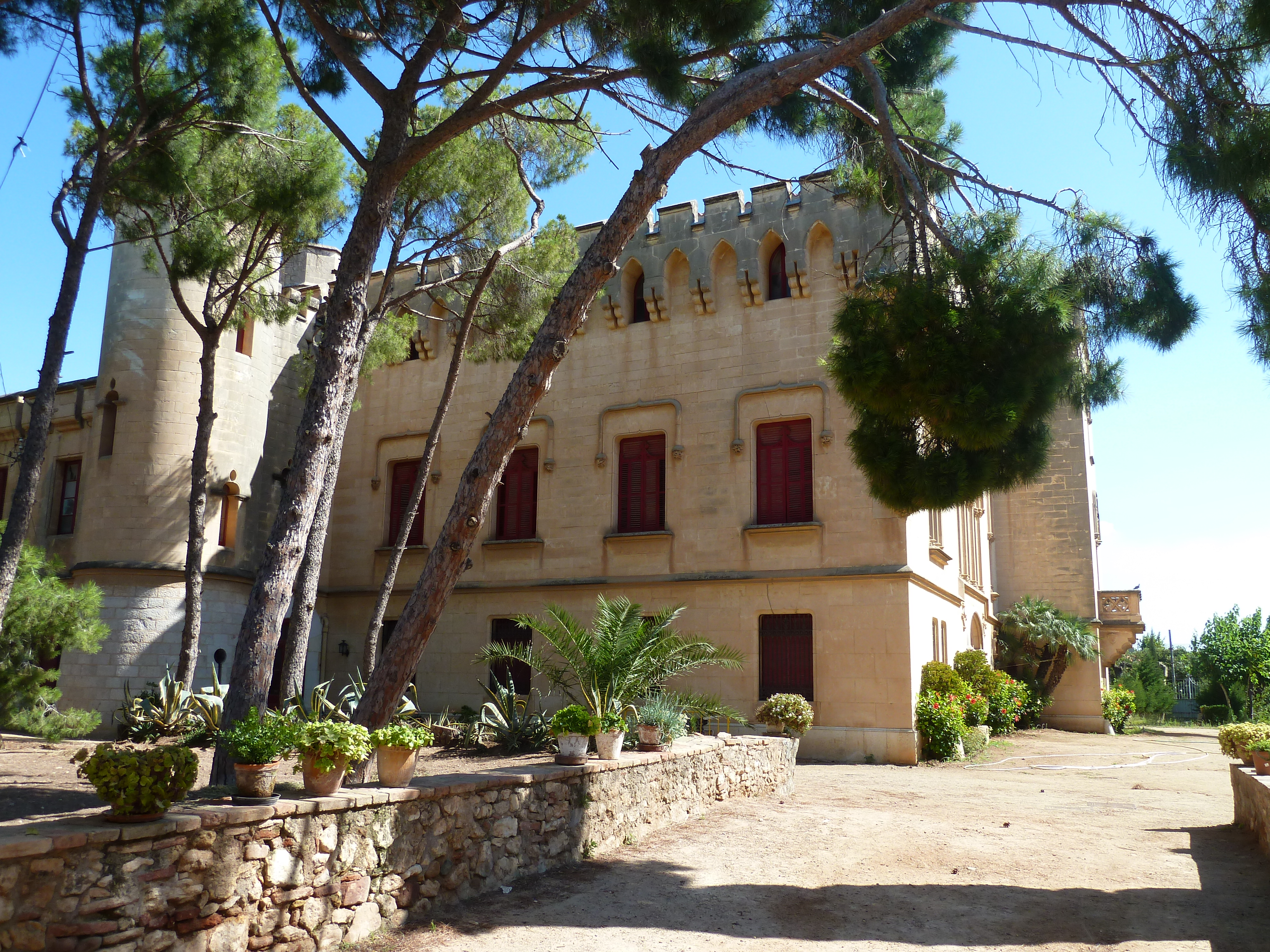 Aquest és el Castell de Vila-seca de Solcina, al Tarragonès.